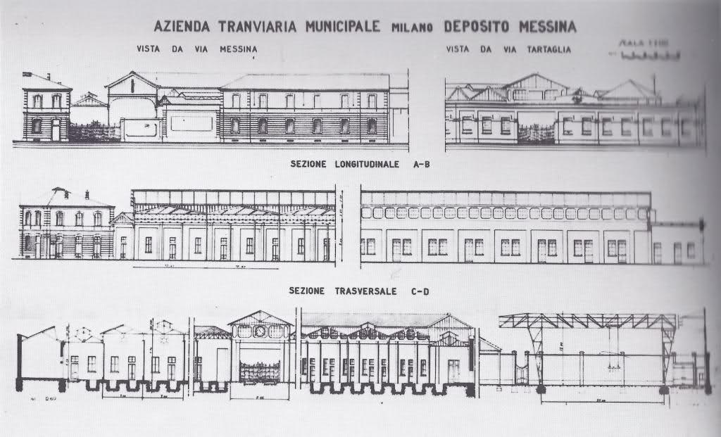 Prospetto del deposito dopo l'ampliamento del 1925-1927